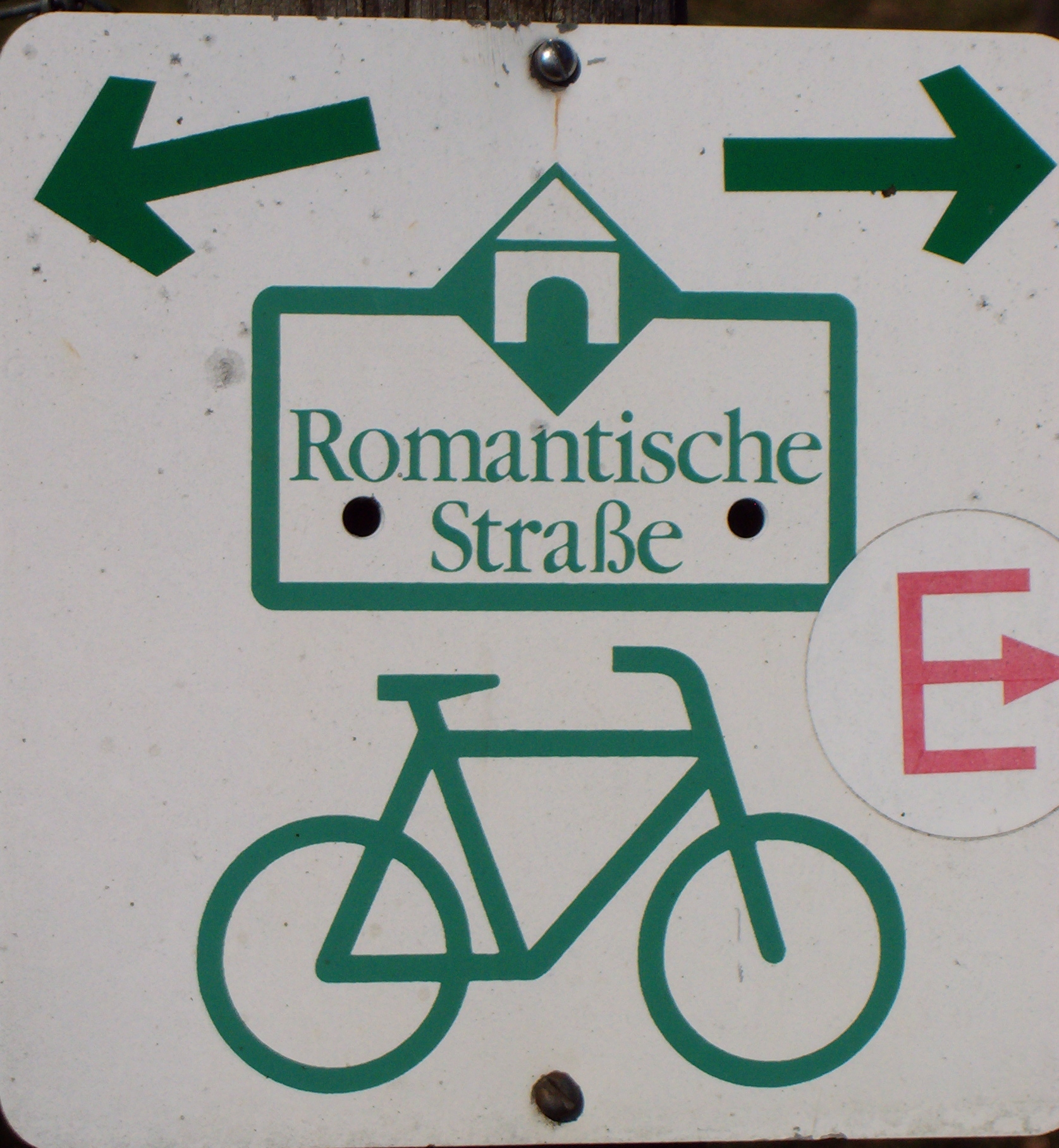 Beschilderung der Fahrradstrecke der Romantischen Straße bei Hohenfurch, Landkreis Weilheim-Schongau